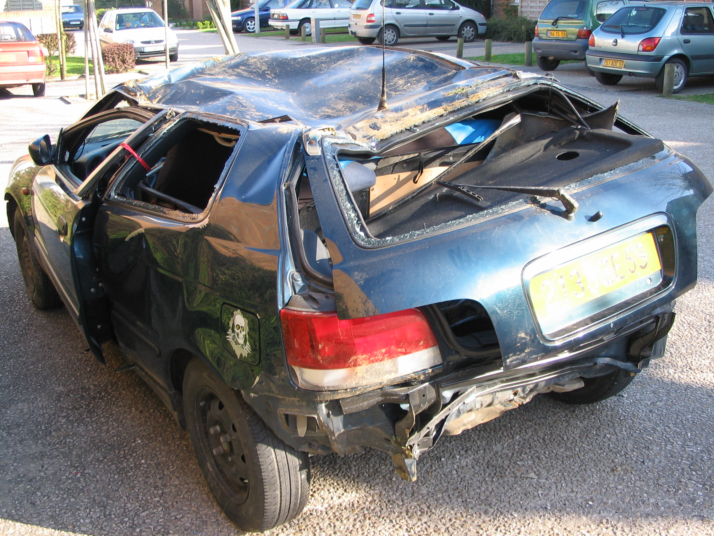 Véhicule ayant effectué plusieurs tonneaux.